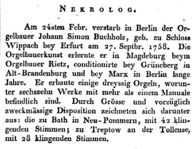 Nekrolog Johann Simon Buchholz